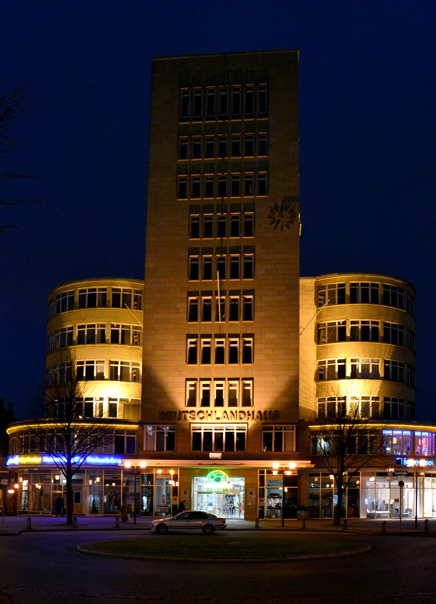 Deutschlandhaus im Essener Stadtkern